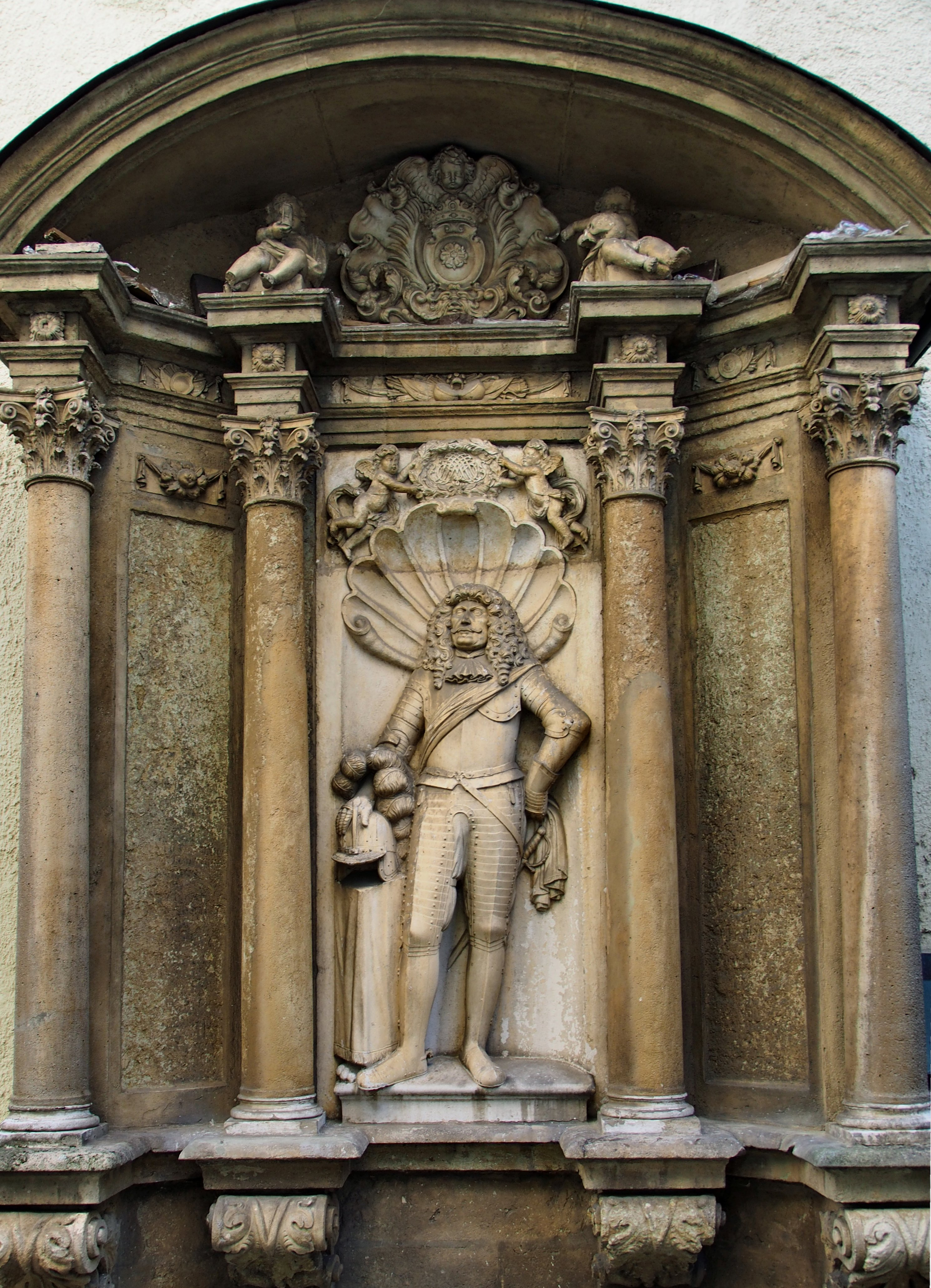 Epitaph Curt Aschen (Ascan) Freiherr von Marenholz († 29. Oktober 1674, begraben 5. Februar 1675), Kurfürstlich Brandenburgischer Geheimer Rat und Präsident der Regierung des Bistums Halberstadt,Gesandter des Kurfürstens von Brandenburg am Reichstag zu Regensburg und Kammerherr. Begraben auf dem Gesandtenfriedhof an der Dreieinigkeitskirche Regensburg (Südseite)